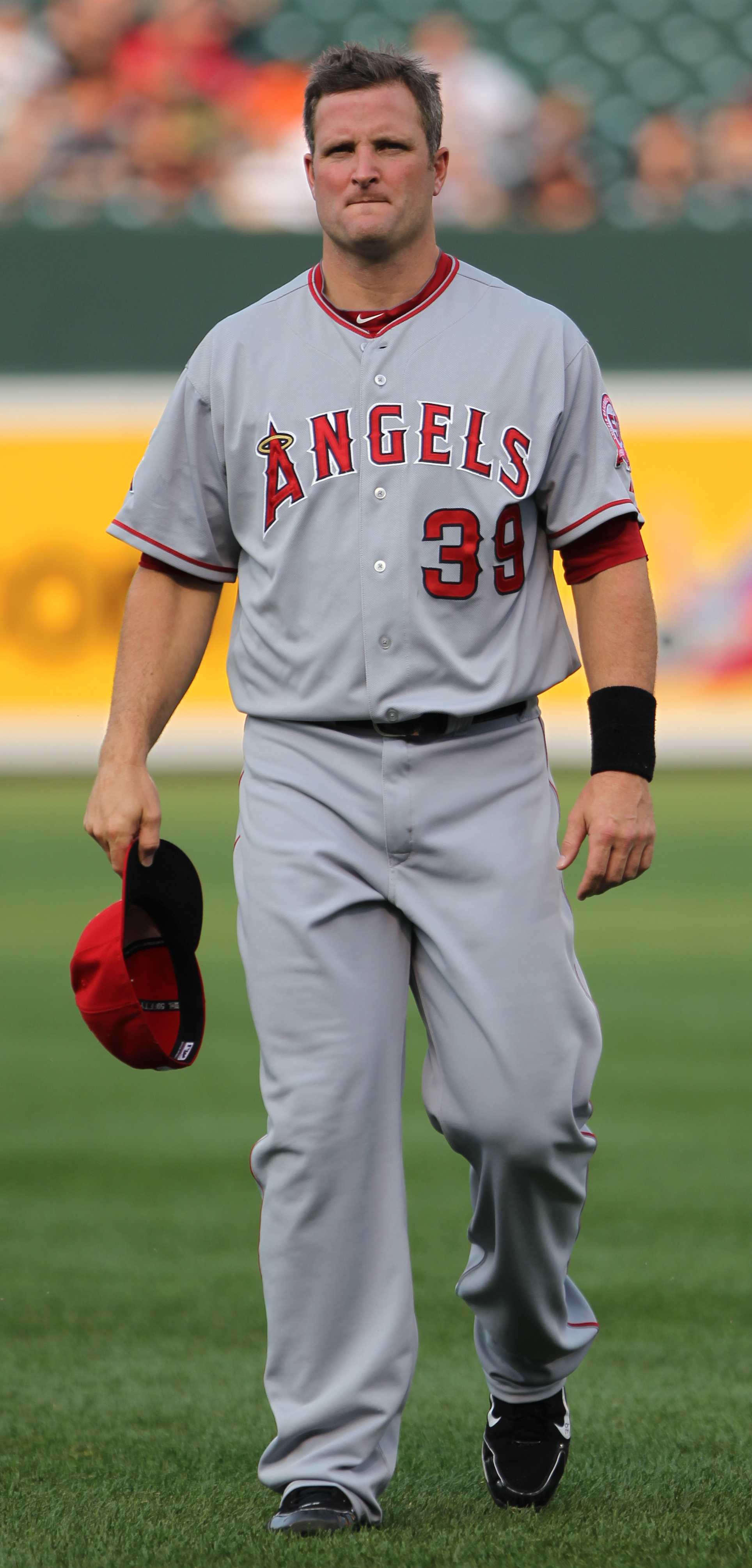 Russell Branyan